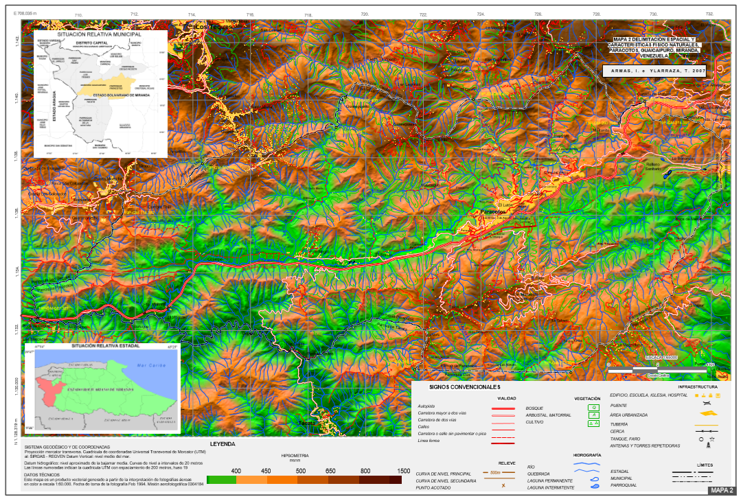 Datos técnicos en la imagen